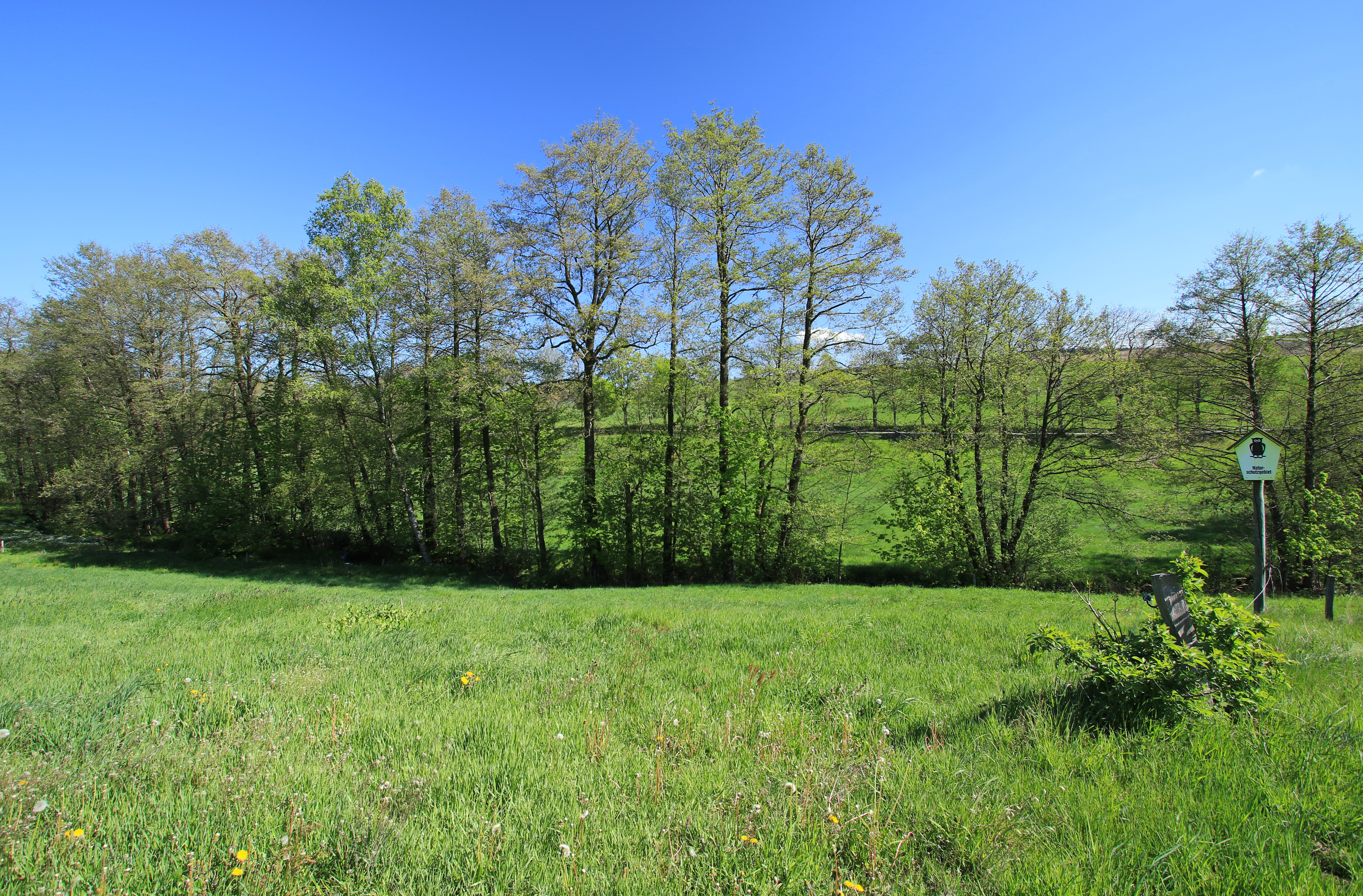 Naturschutzgebiet "Vordere Aue" C 52 in Sachsen . Erzgebirgskreis.